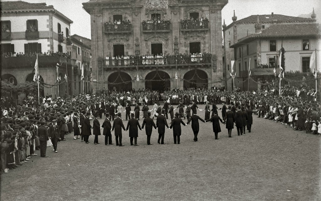 Título original: Celebración del I Congreso Internacional de Estudios Vascos de Eusko Ikaskuntza en la localidad de Oñati (7/9) Localización: Oñate (Guipúzcoa)